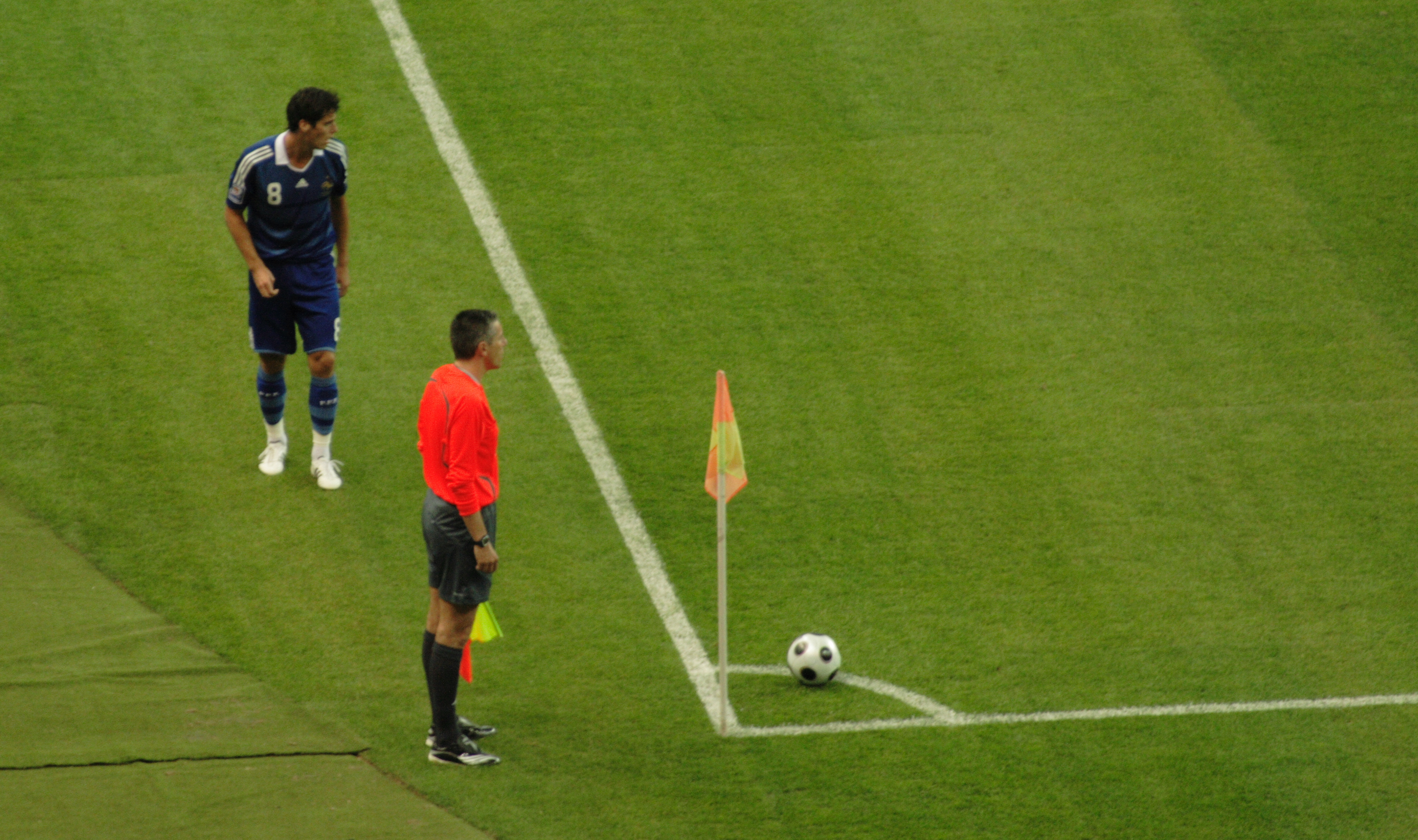 Le français Gourcuff qui tire un coup de pied de coin durant le match France Serbie au Stade de France